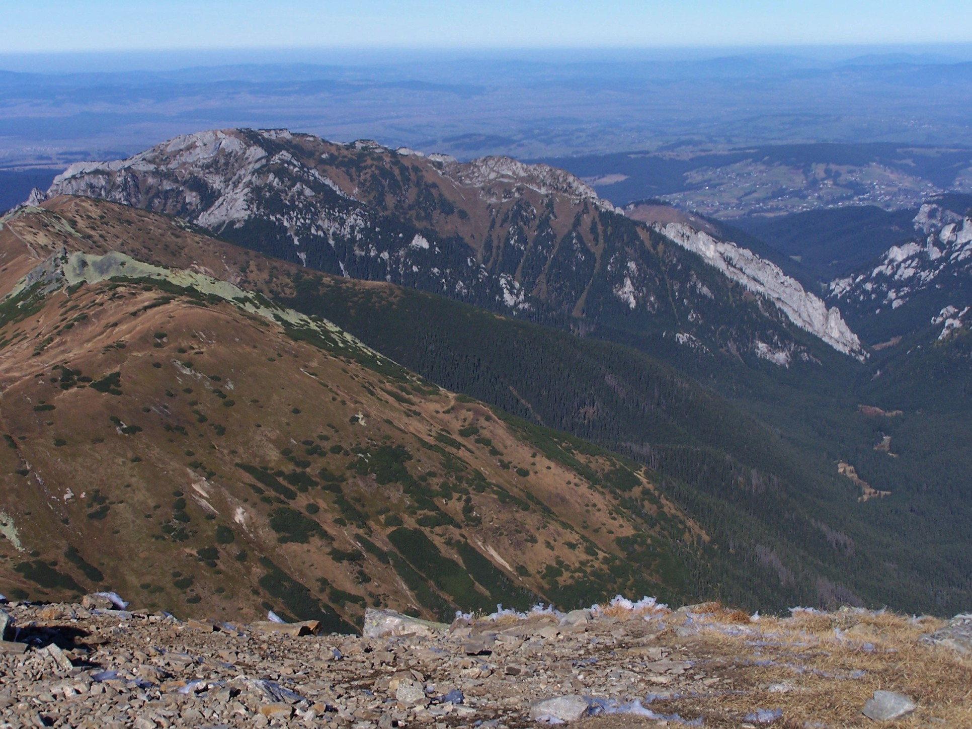 Widok z Błyszcza:Dolina Kościeliska, Ornak i Kominiarski Wierch